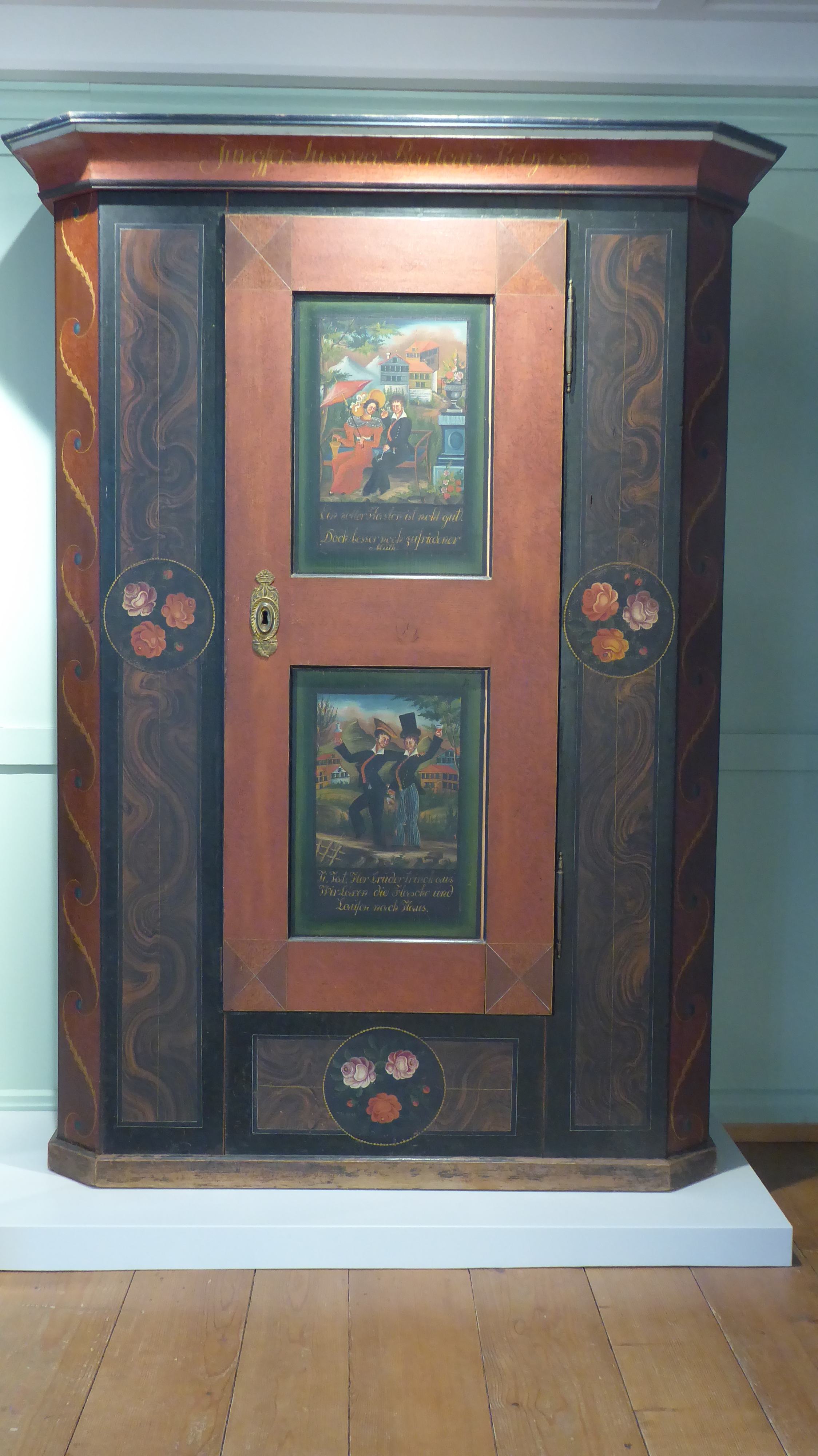 Kasten für «Susanna Barbara Kolp», 1829